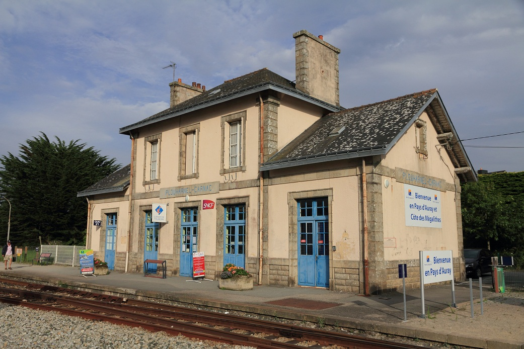 Vue du bâtiment voyageurs de la gare de Plouharnel - Carnac en août 2011, Bretagne, France.